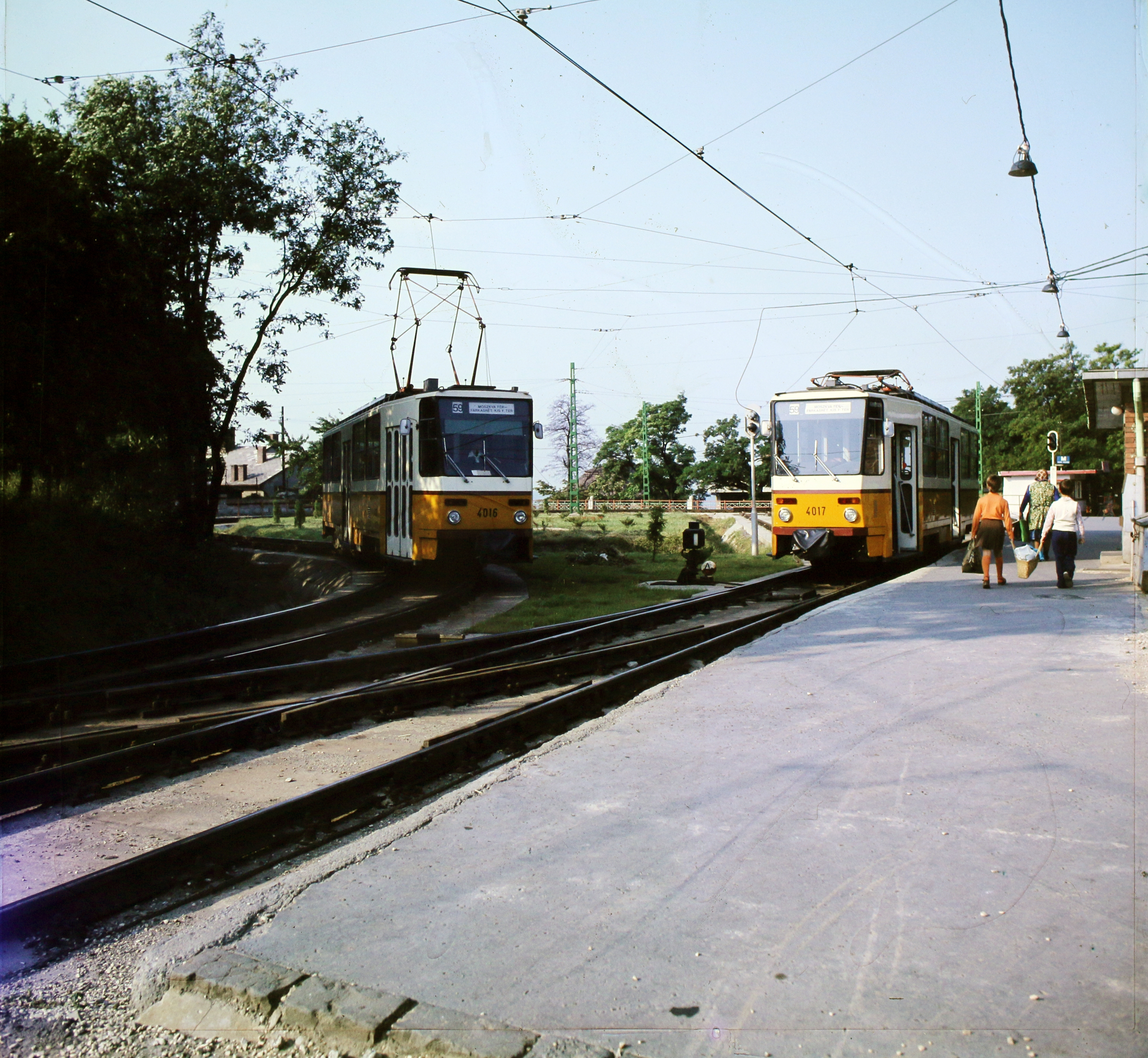 Márton Áron (Kis Ferenc) tér, az 59-es villamos végállomása a Farkasréti temető felső bejáratánál. Location: Hungary, Budapest XII. Tags: colorful, tram, Tatra-brand, Czechoslovak brand, tram stop, Budapest Title: Márton Áron (Kis Ferenc) tér, az 59-es villamos végállomása a Farkasréti temető felső bejáratánál.